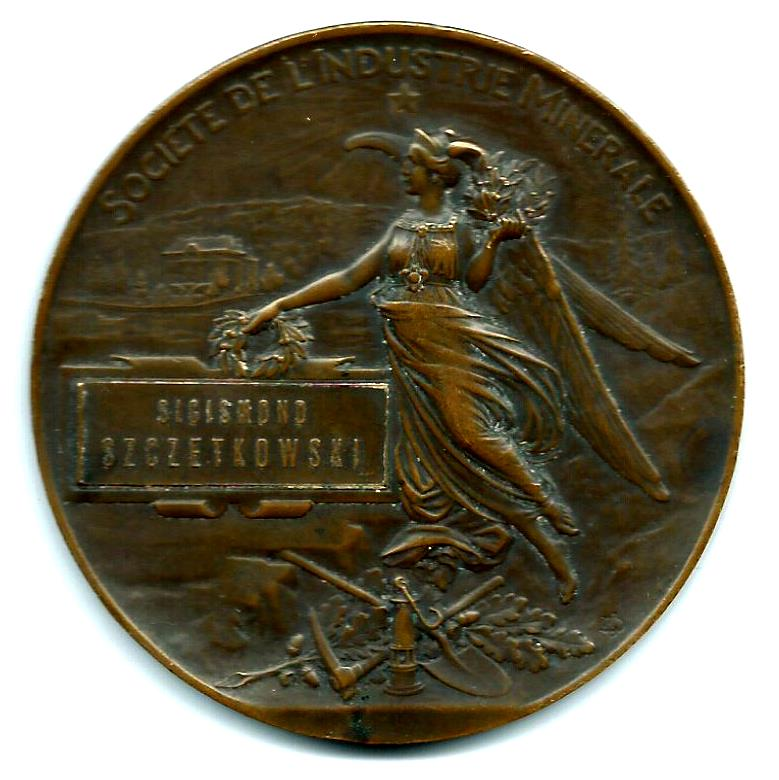 medal pamiątkowy Société de l'industrie minérale wręczony Zygmuntowi Szczotkowskiemu ok. 1930 r.; projekt medalu: G. Dupré (1869-1909)